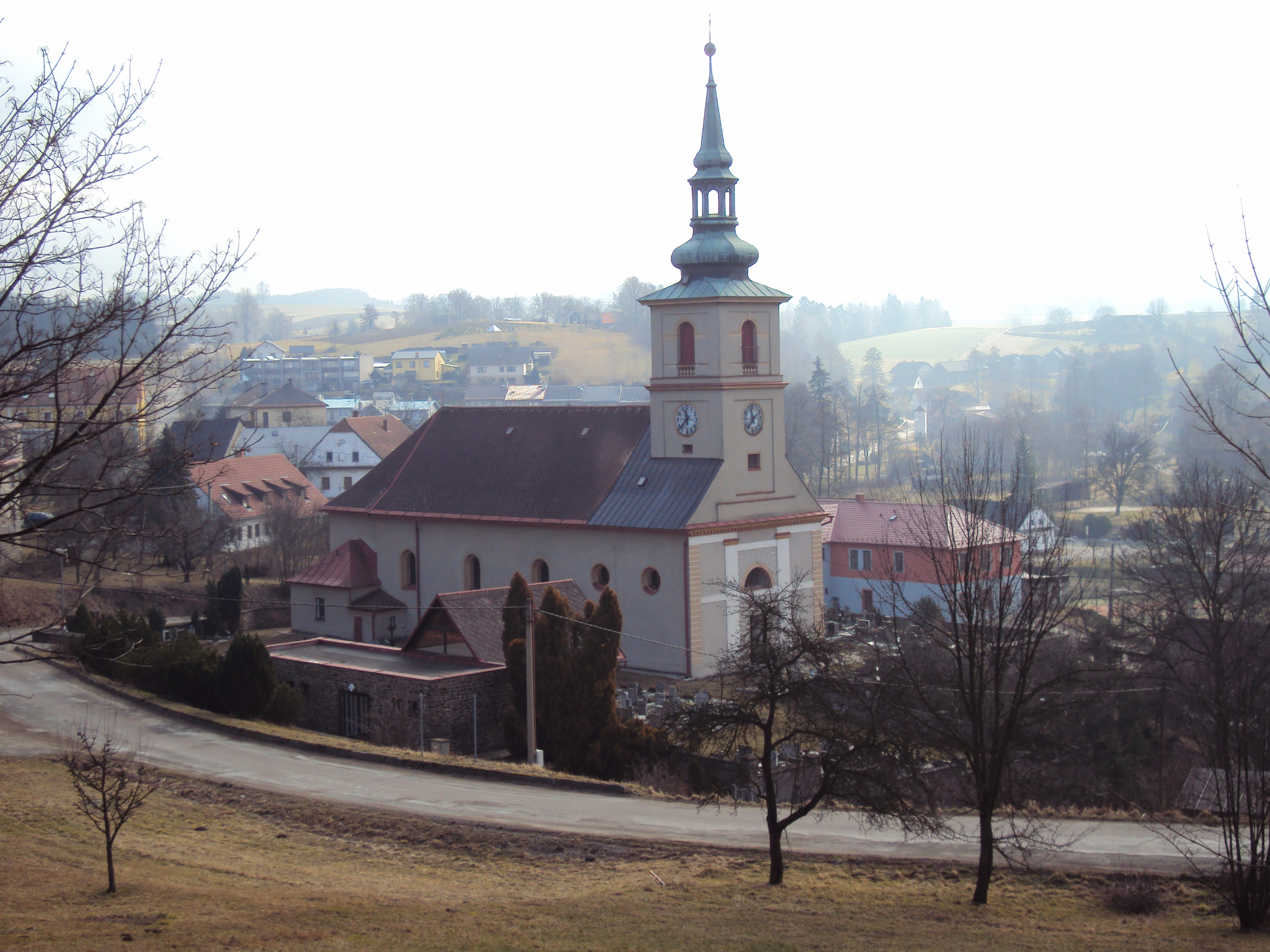 Kostel Bystřec